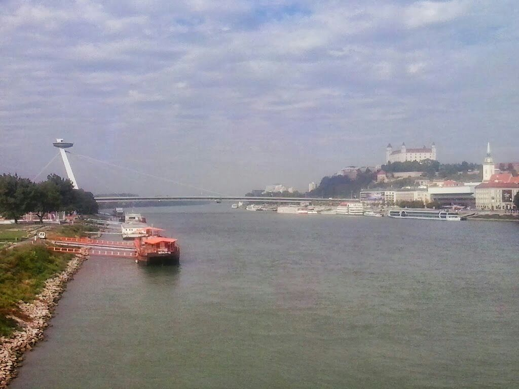 Danubio. El Gran Danubio